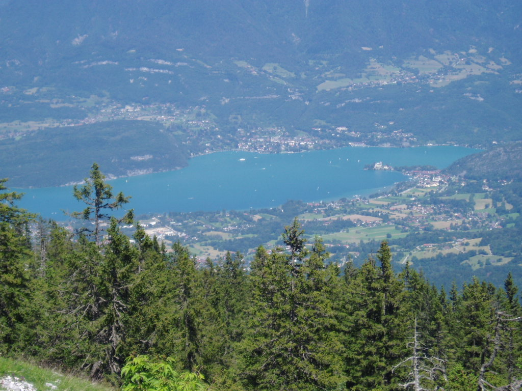 Lac Annecy